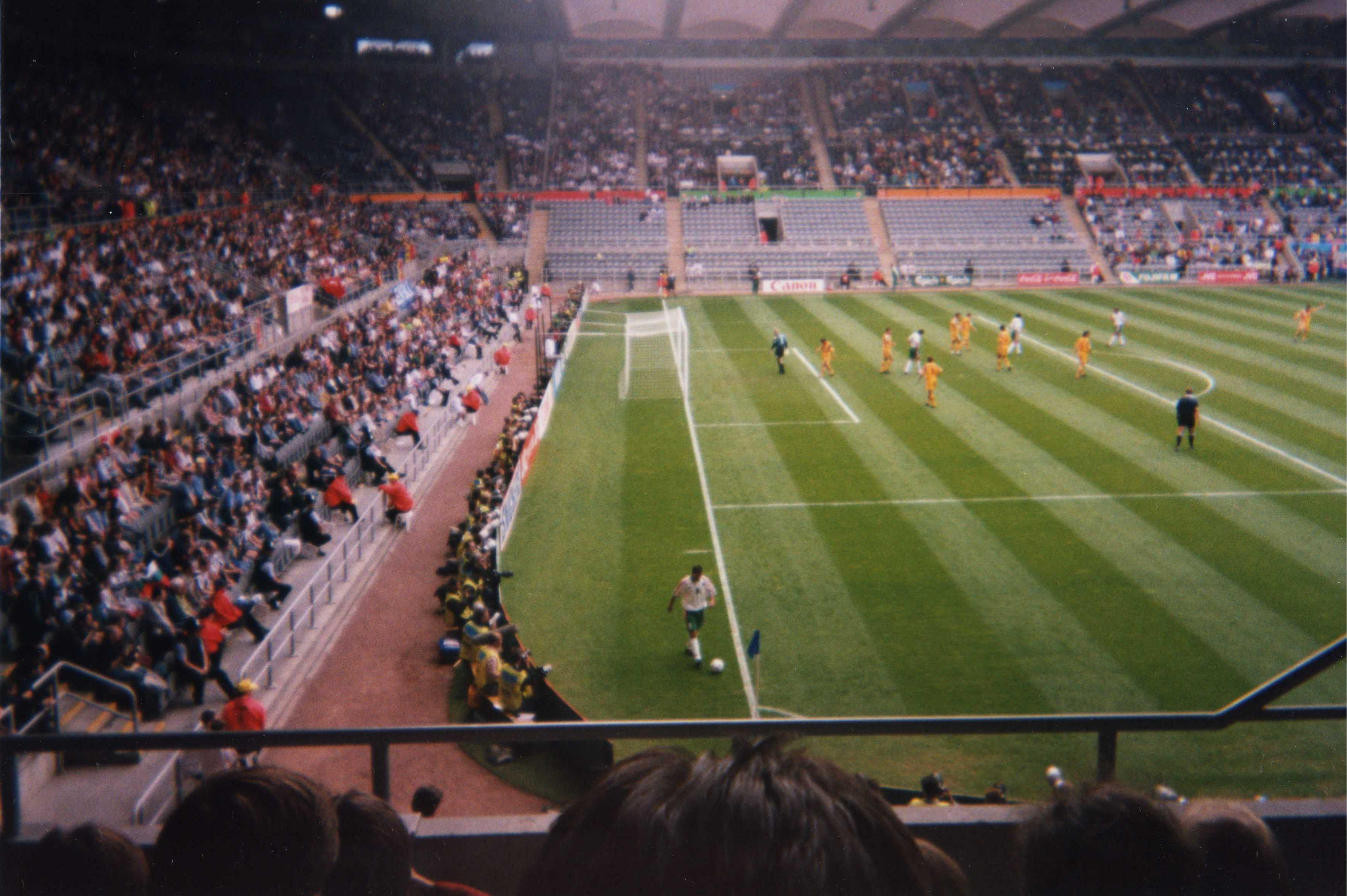 Bulgaria v Romania at UEFA Euro 96, St James' Park